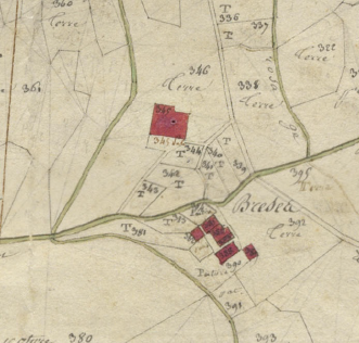 Breses (Mosset) en el Cadastre napoleònic del 1812 (Arxius Departamentals dels Pirineus Orientals)